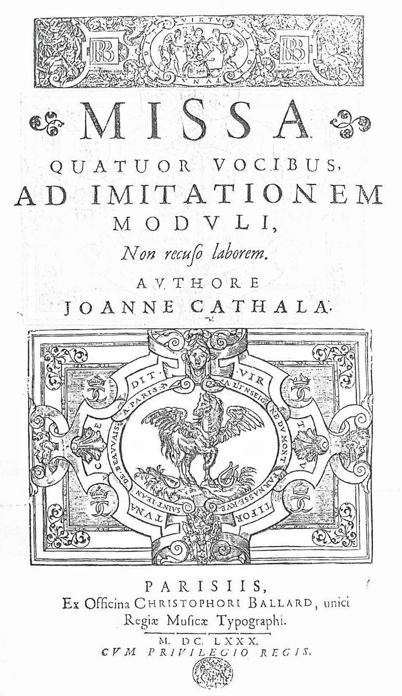 Title page of Cathala's mass "Non recuso laborem" (Paris : 1680)